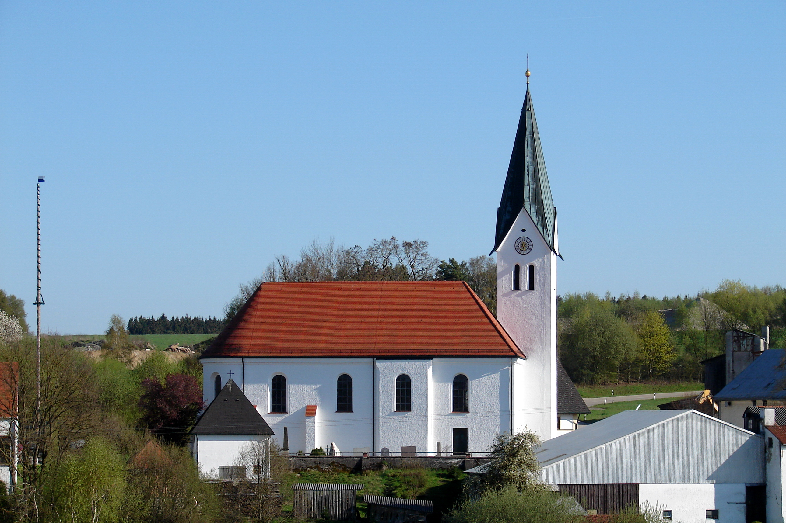 Barocker Saalbau mit Apsis und spätgotischem Westturm, Neubau von Johann Georg Hirschstötter 1738-40; mit Ausstattung